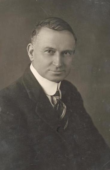 John Jennings